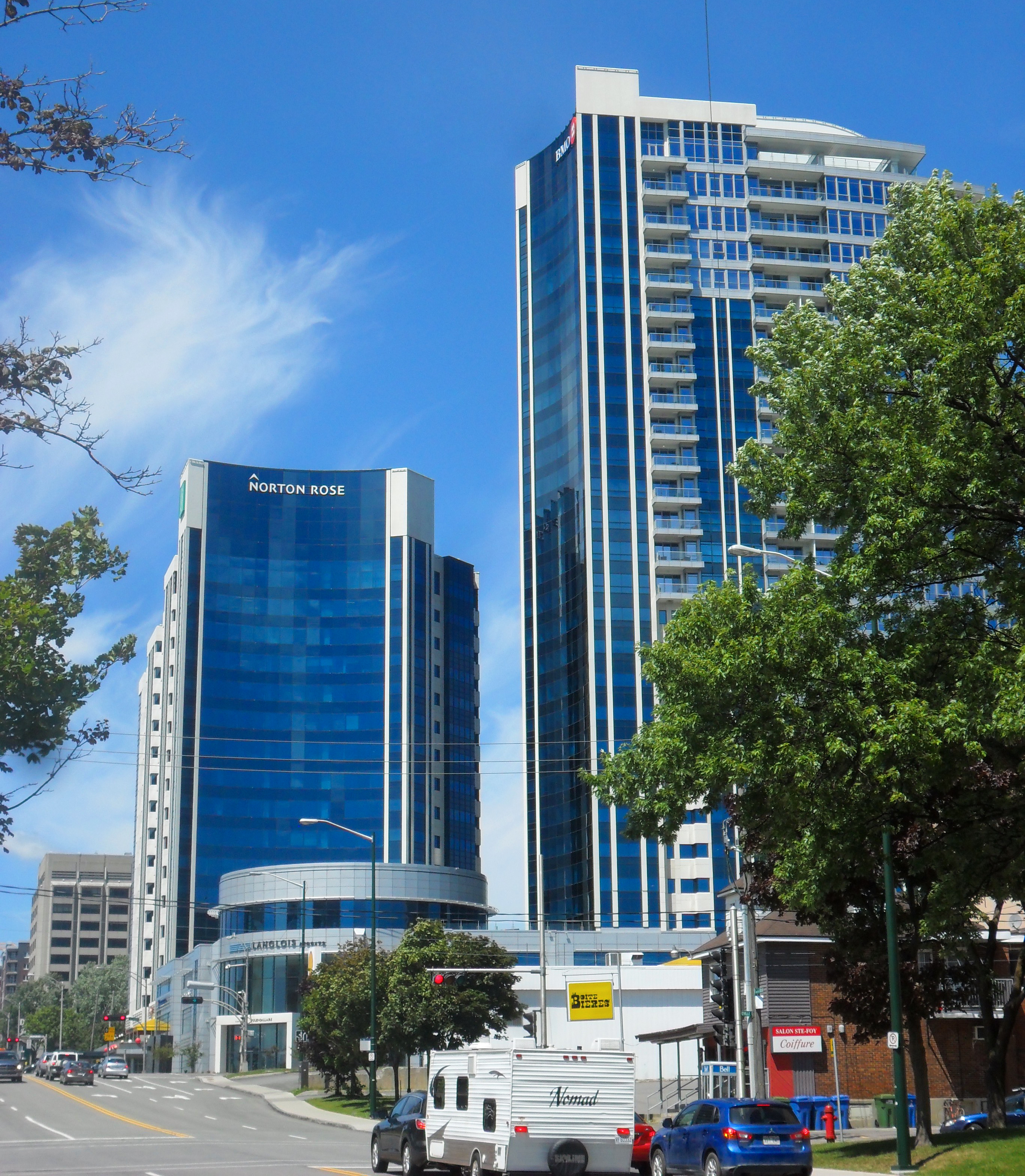 Complexe Jules-Dallaire vue depuis la route de l'Église.